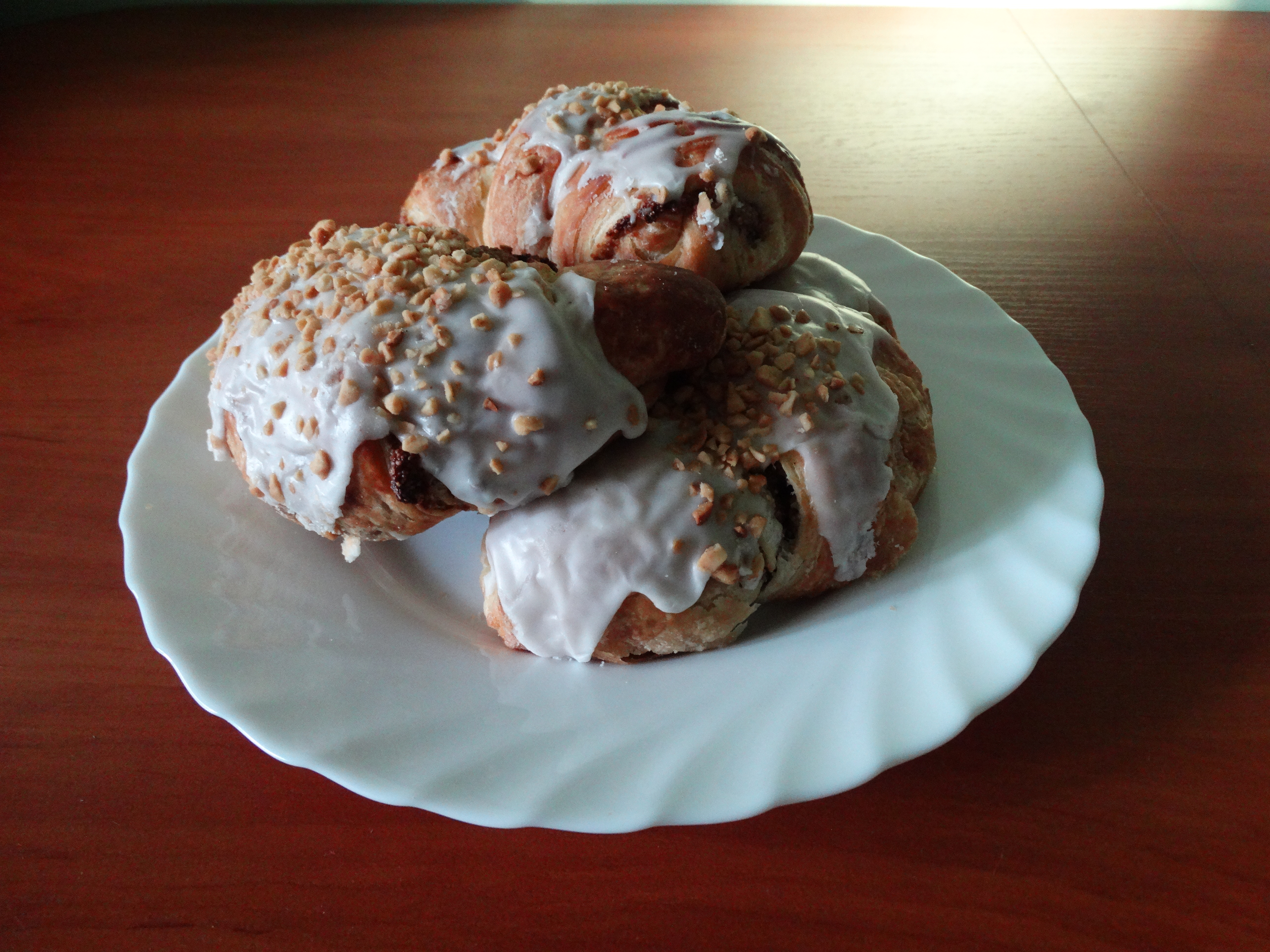 Rogal świętomarciński (cukiernia Jacek Błaszkowiak)